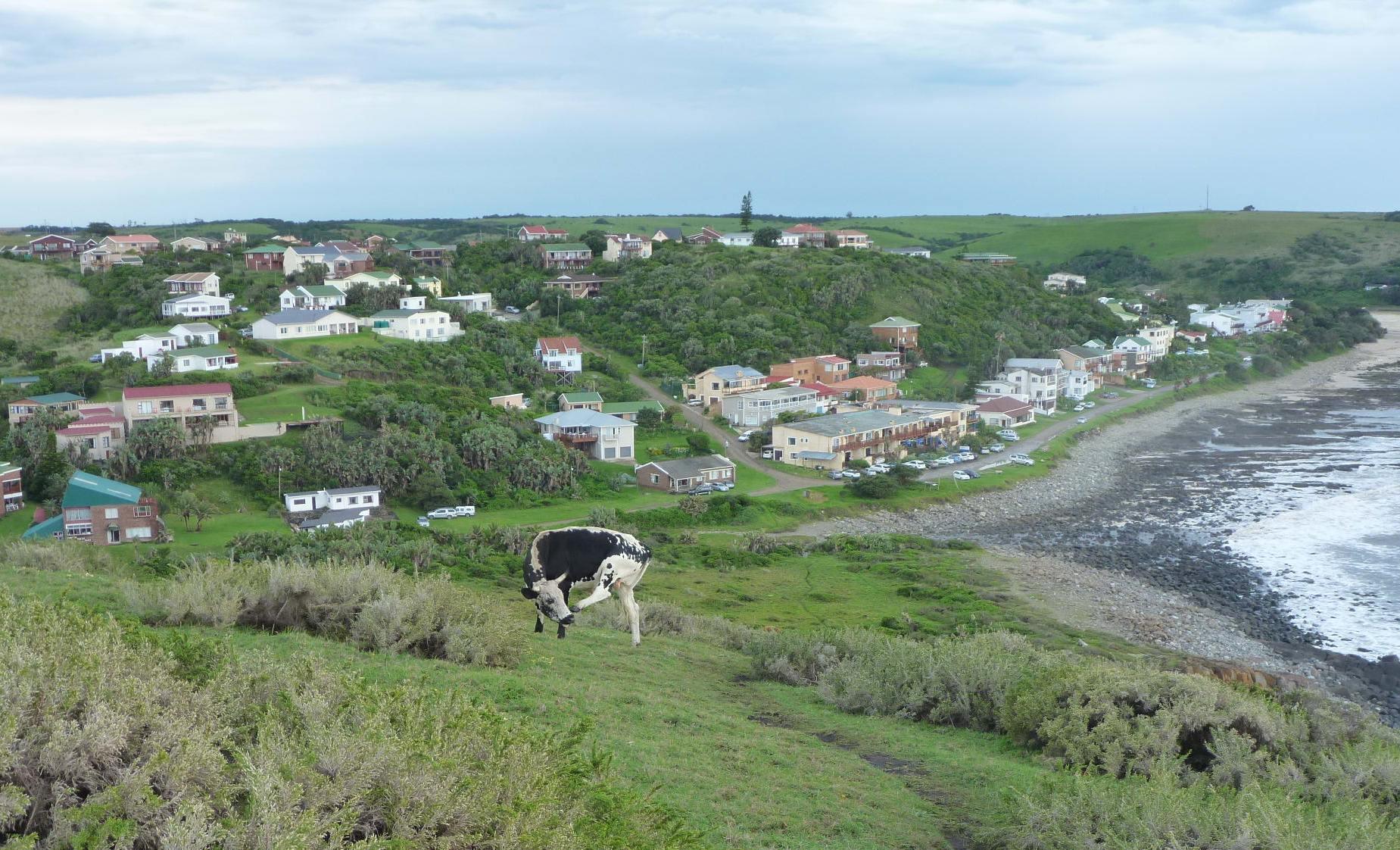 Morgans Bay